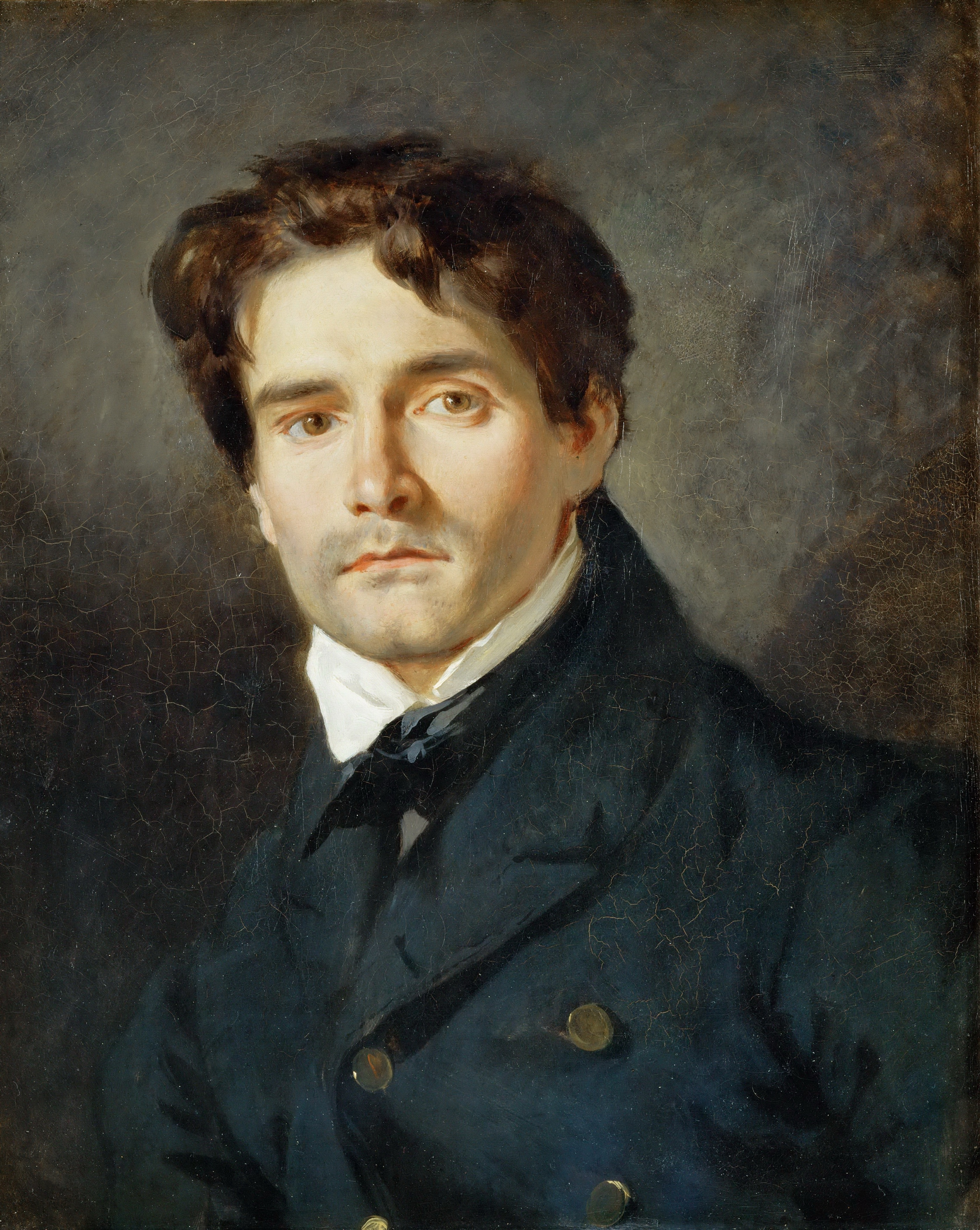 Le peintre Léon Riesener (1808 - 1878) était le cousin de l'artiste